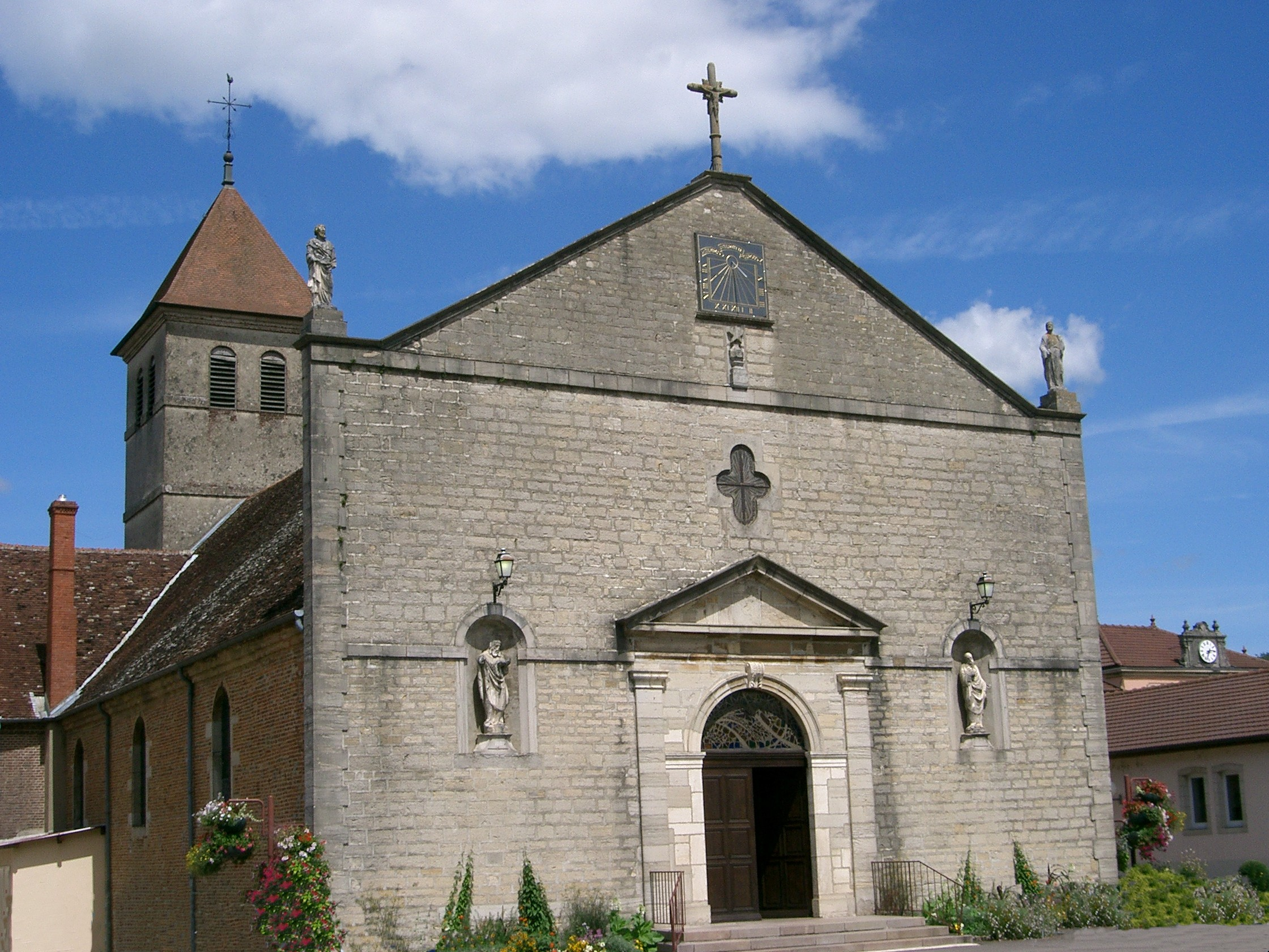 Facade de l'église de Saint-Germain-du-Bois (Saône-et-Loire - France)